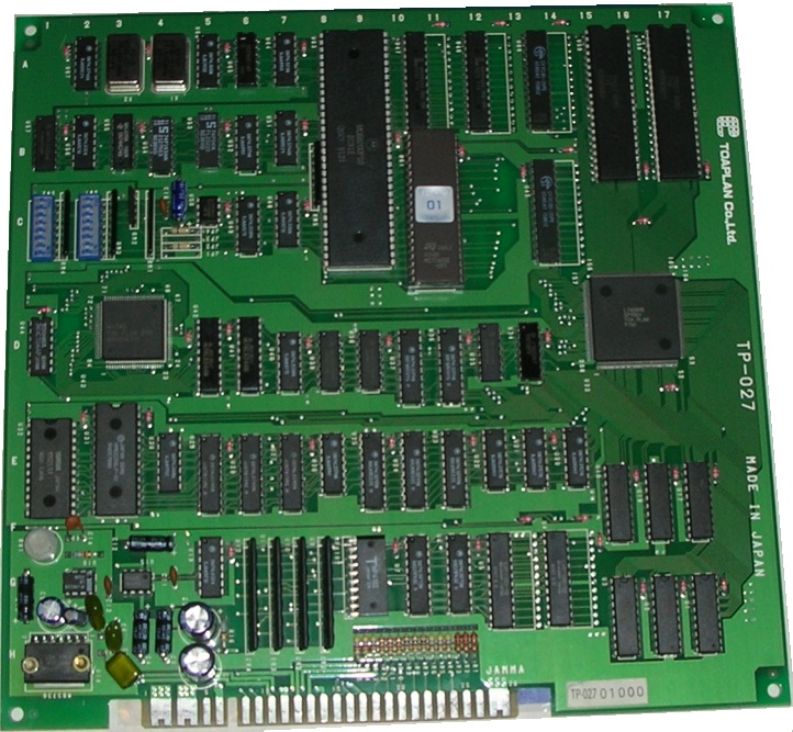 V-V arcade PCB